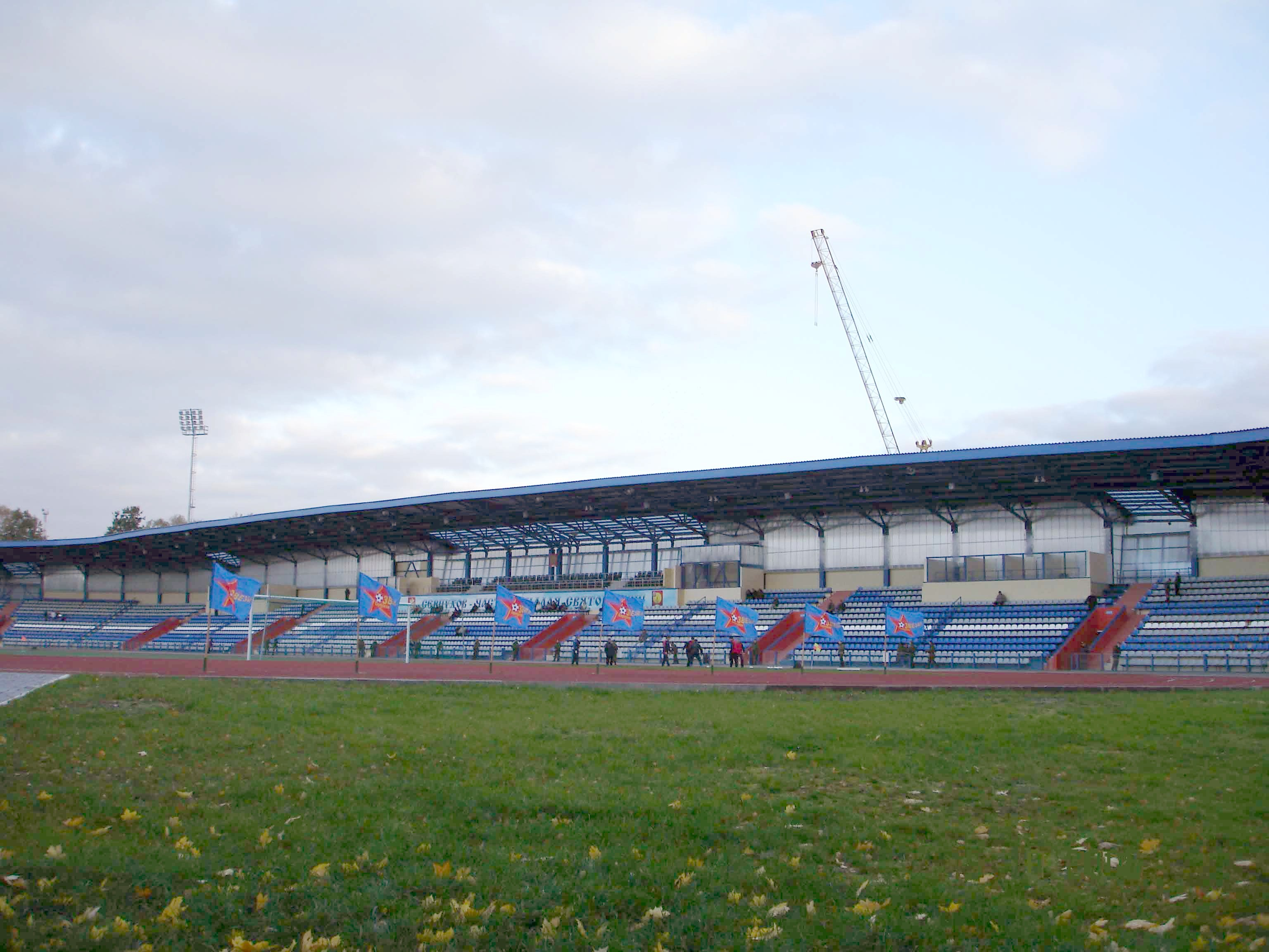 Серпухов. Стадион труд. Вид на поле и трибуну изнутри.]